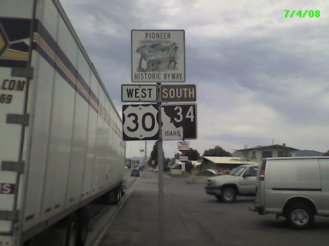 Us30 West Bound @ Soda Springs ID